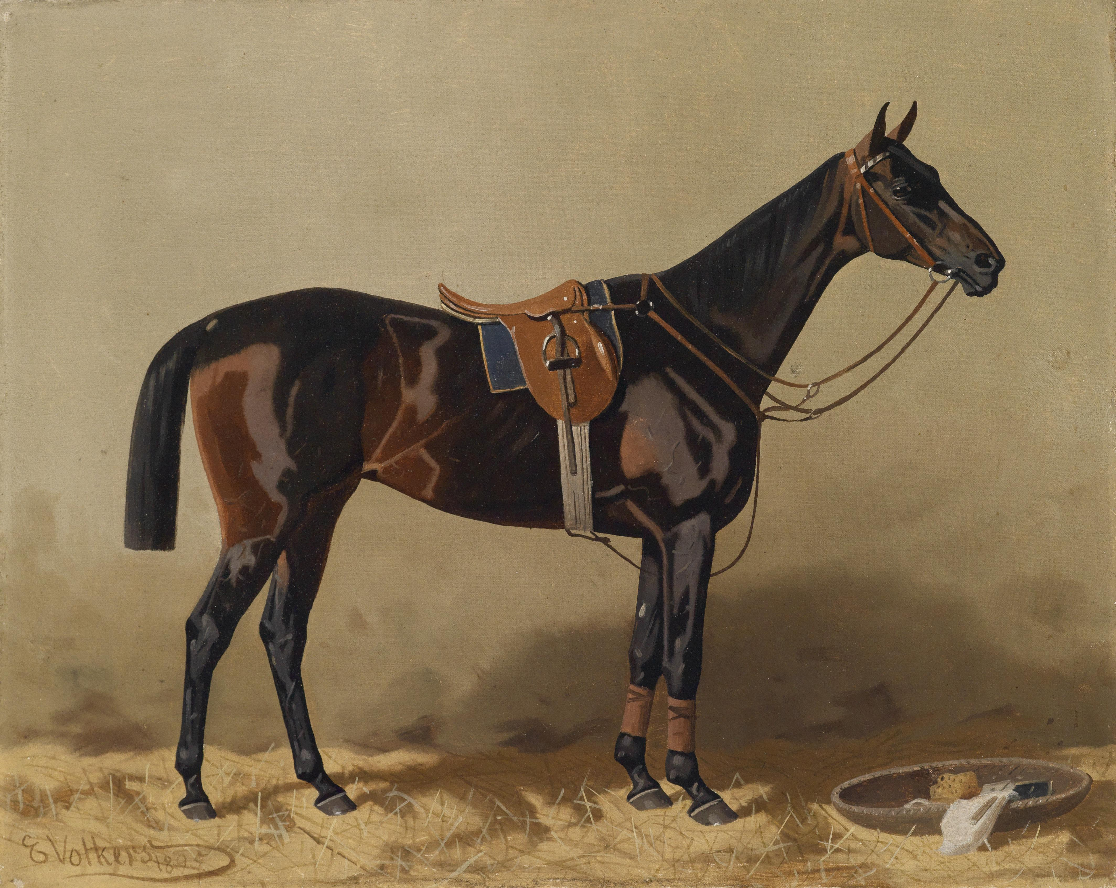 Gesatteltes Sportpferd, datiert E. Volkers 1895, Öl auf Leinwand, 49,5 x 50,5 cm